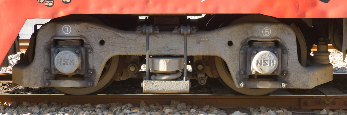 豊橋鉄道東田本線モ3500形のD20A形台車。車軸のみ1,067mm軌間用に交換している。